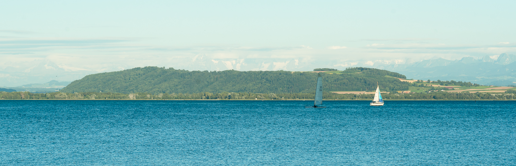 Le Mont Vully depuis le port de Hauterive.